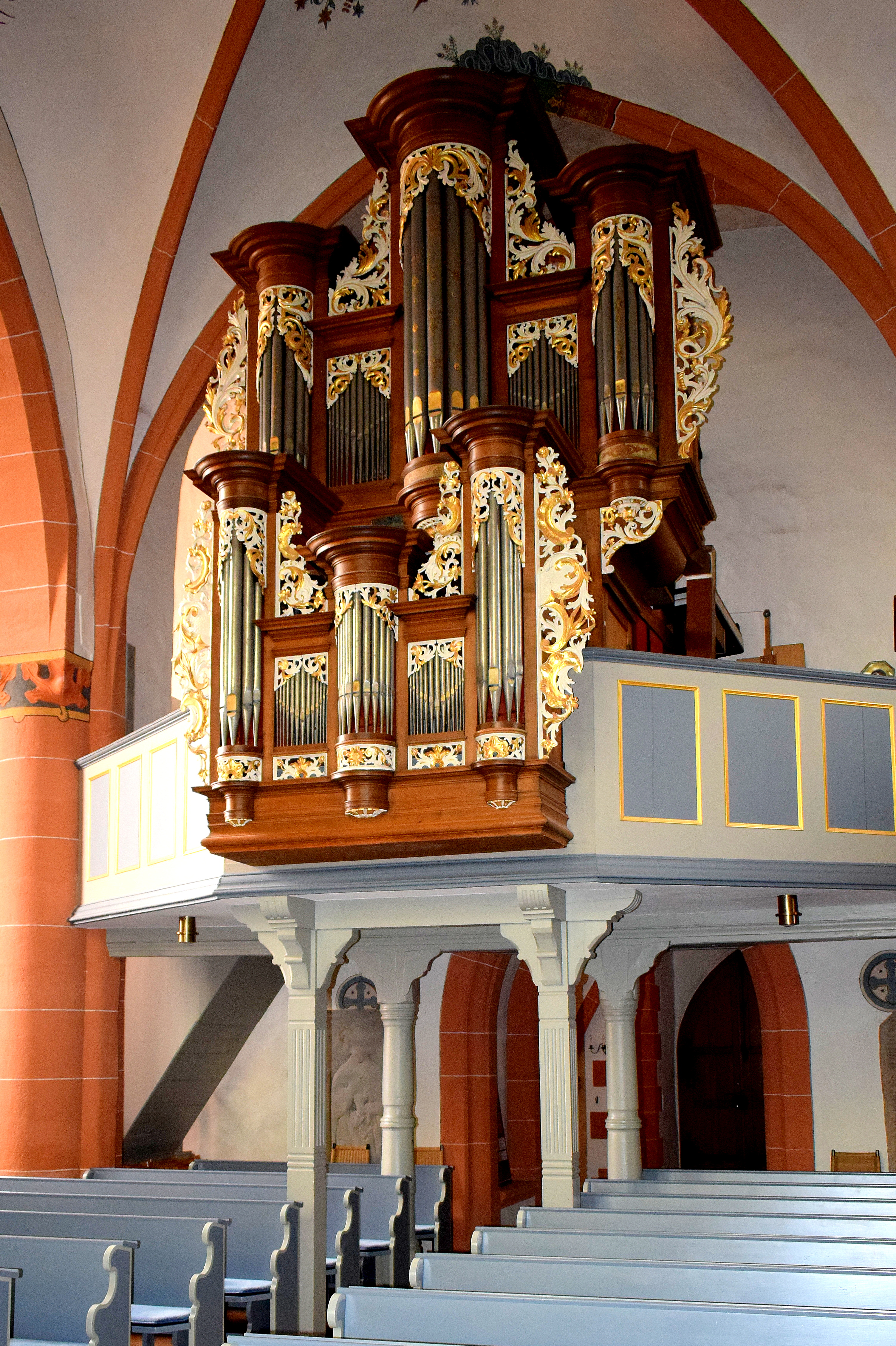 Armsheim, Kirche zum Heiligen Blut, Orgel Johann Michael Stumm